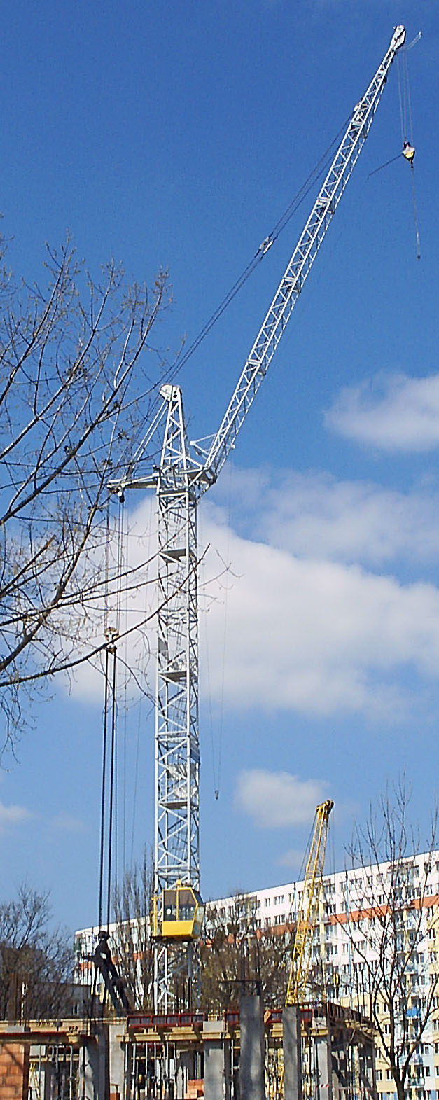 Dźwig budowlany Żuraw ŻB 75/100. Autor Sebastian Maćkiewicz.